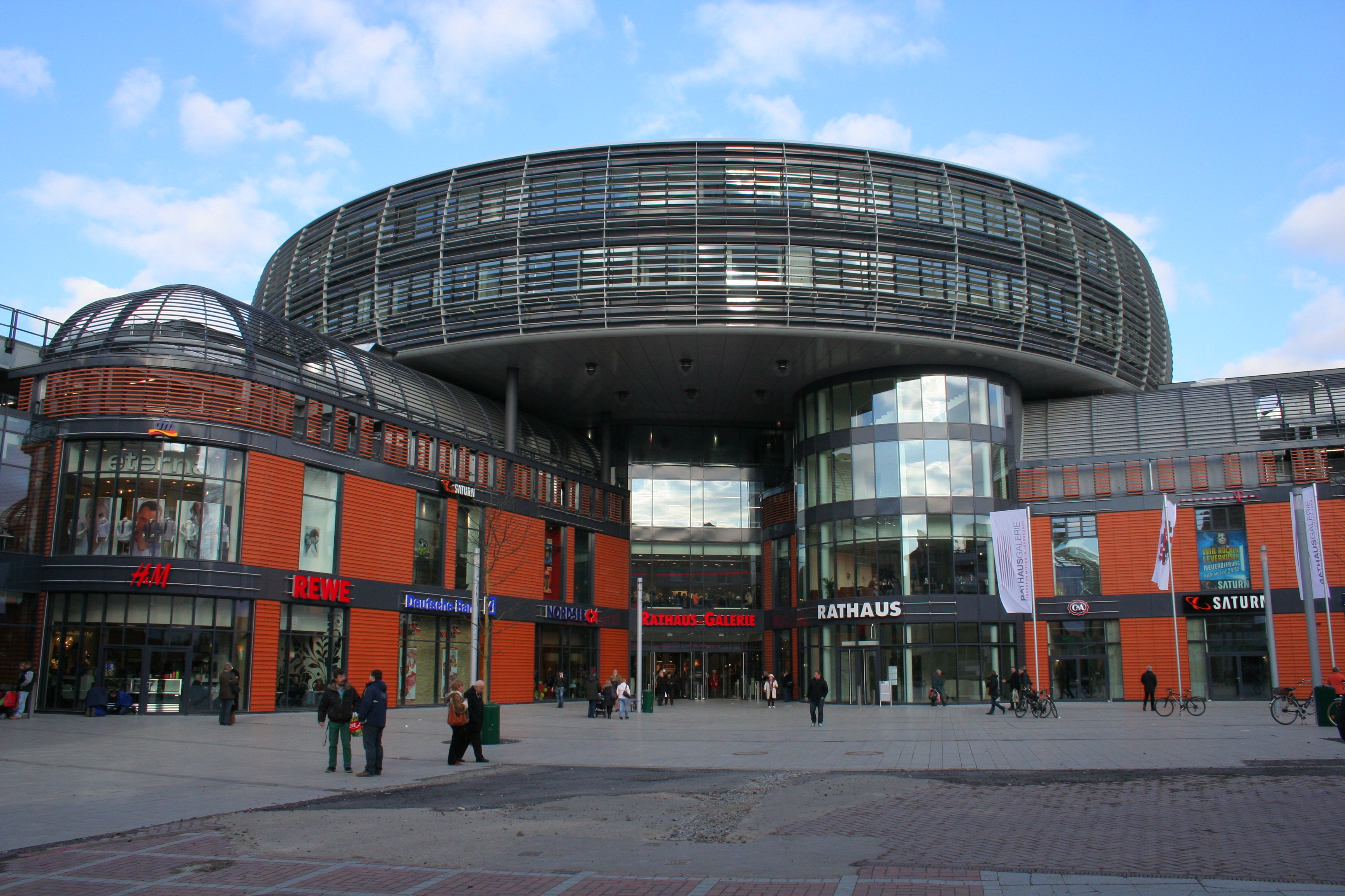 Rathaus-Galerie in Leverkusen-Wiesdorf